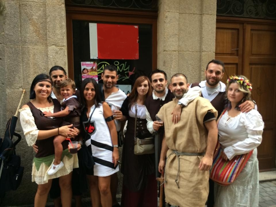 Grupo de visitantes ataviados con trajes medievales